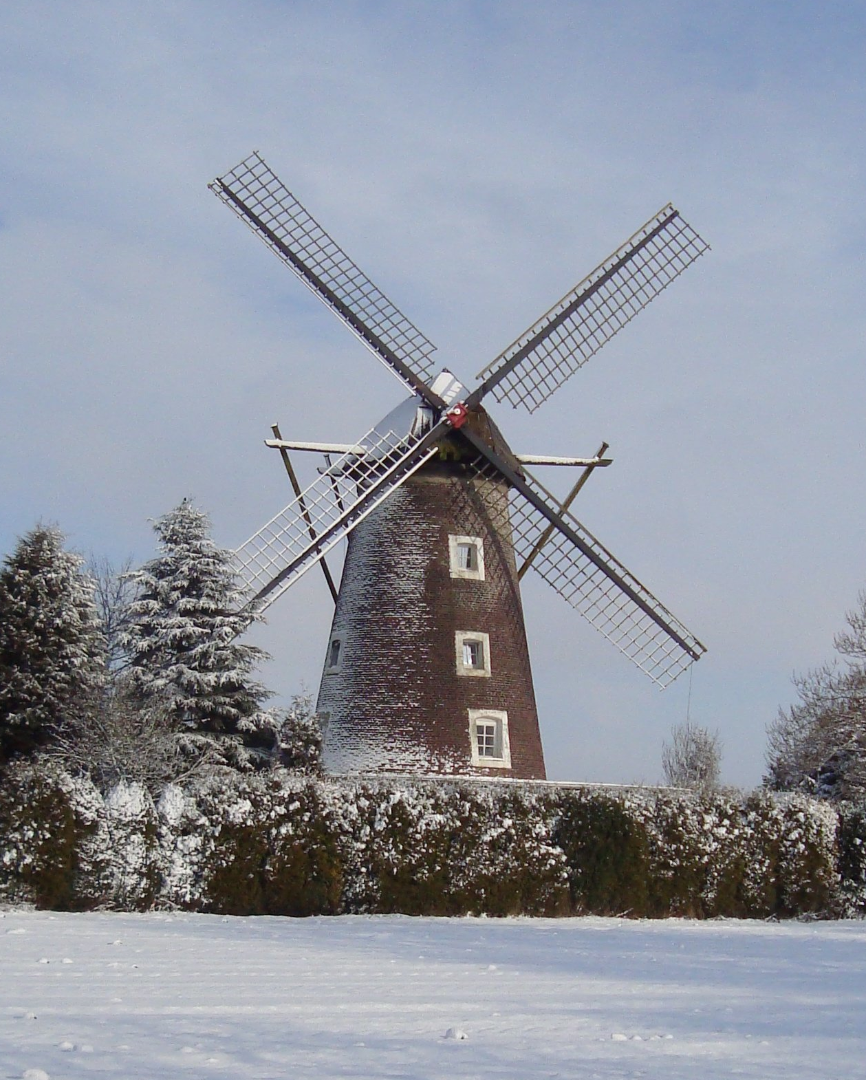 Foto der Dahlenmühle in Sevelen, Winter 2009/2010; Ansicht aus Richtung des neuen Friedhofs